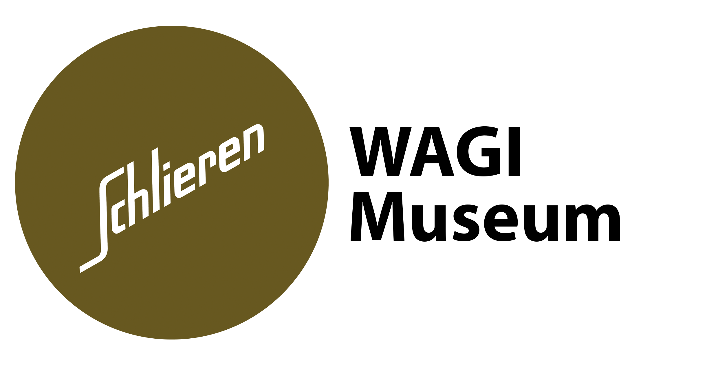 Das offizielle Logo des WAGI Museum Schlieren